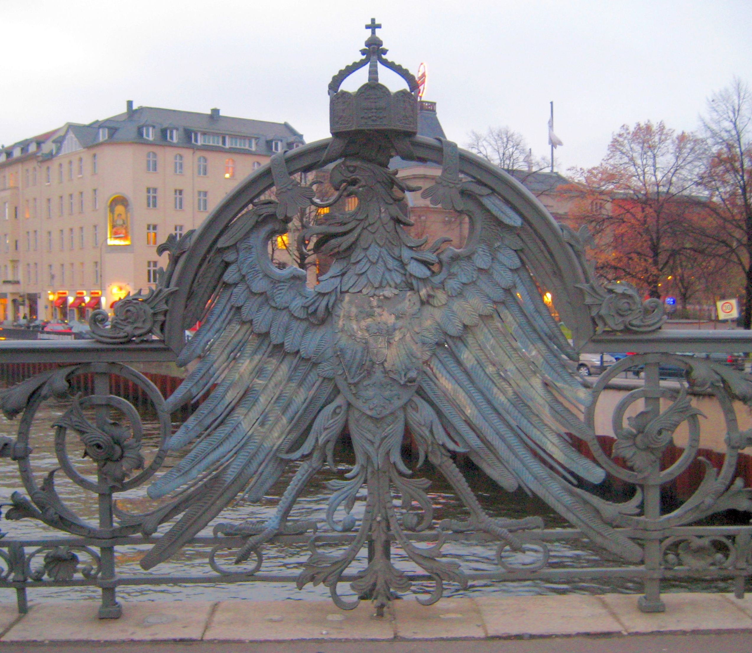 wrought-iron Prussian eagle at Weidendammer Brücke, Friedrichstraße, Berlin